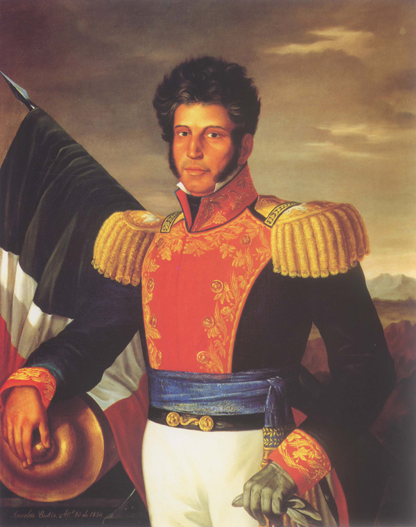 Retrato de Vicente Guerrero (1782-1831)